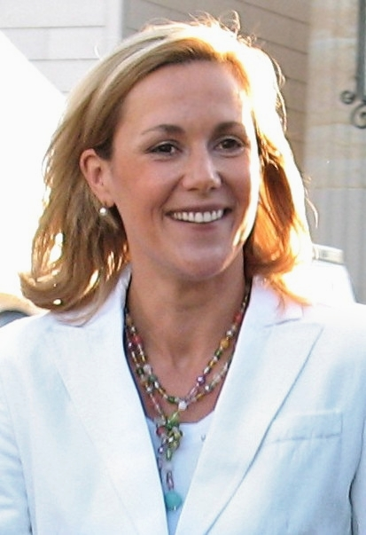 Bettina Wulff auf dem Pariser Platz in Berlin